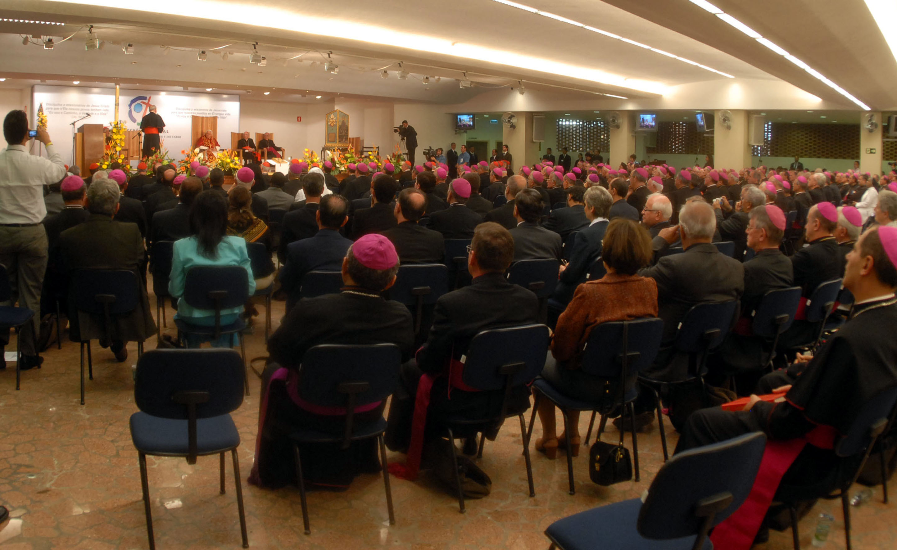 Papa Bento XVI faz a abertura solene da Quinta Conferência Geral do Episcopado Latino-americano e Caribenho, em Aparecida, interior do estado de São Paulo, Brasil.